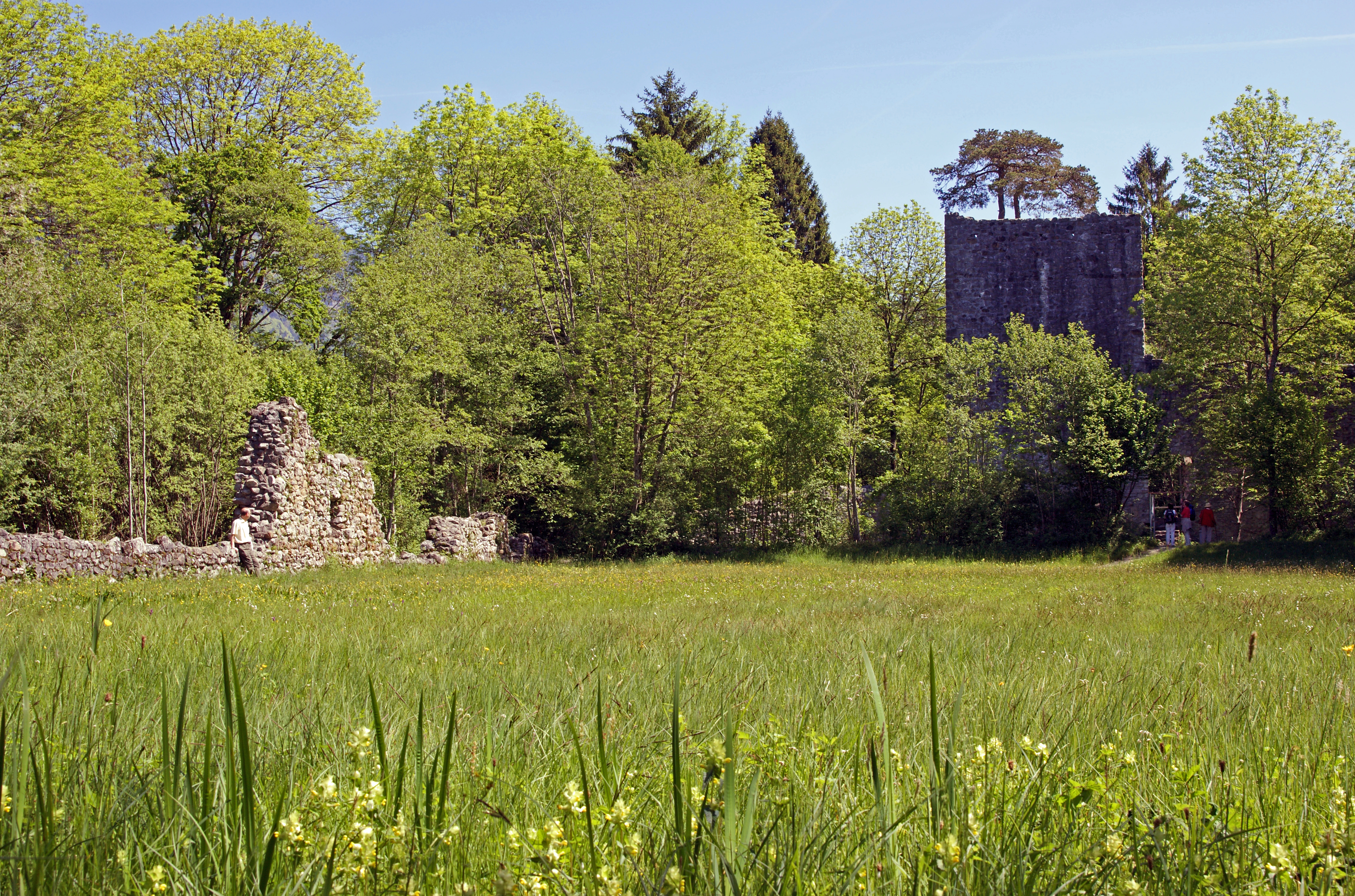 Ruine Weissenau Unterseen